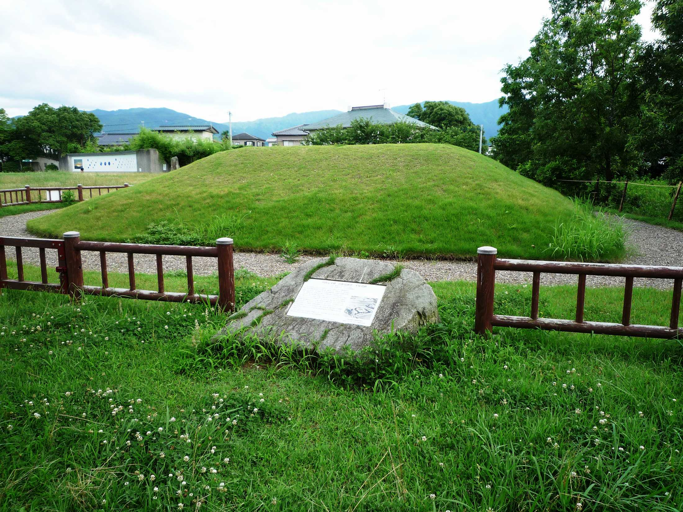 平原遺跡1号墓